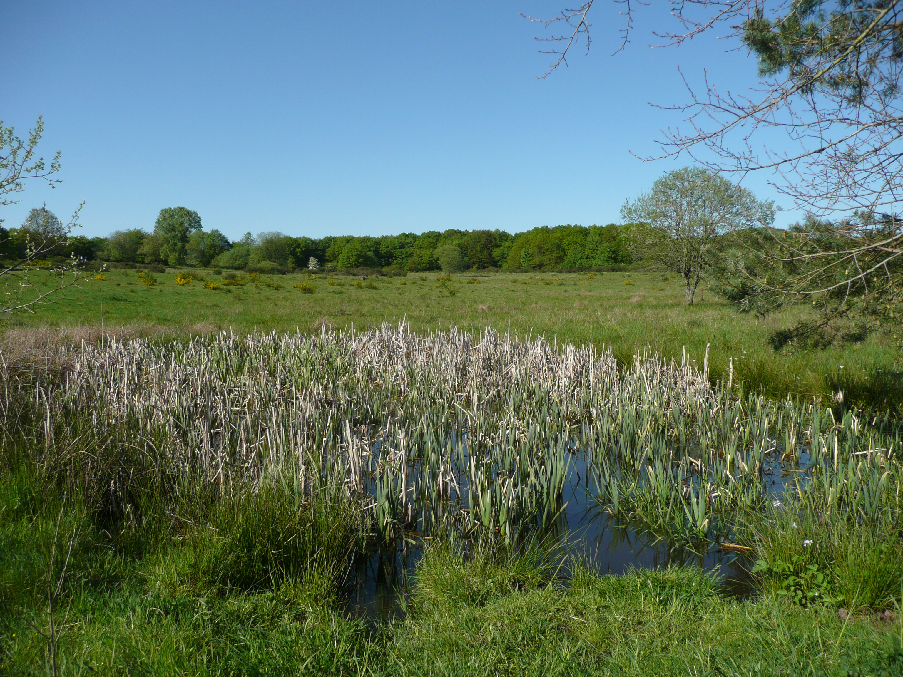 Naturschutzgebiet 'Kleine Lummersbach bei Cyriaxweimar' bei Marburg im Mai.